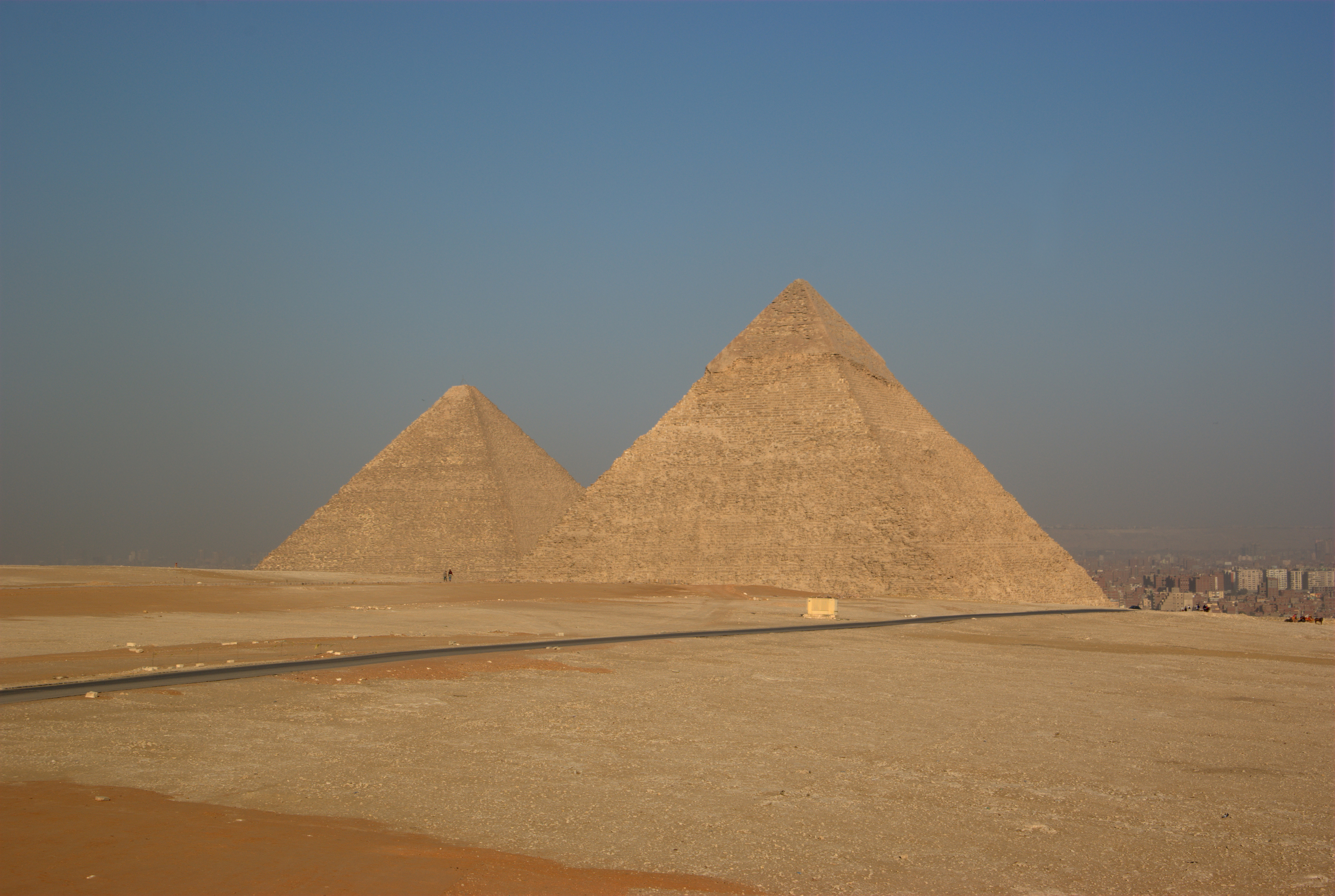 Cheops und Chepren Pyramide